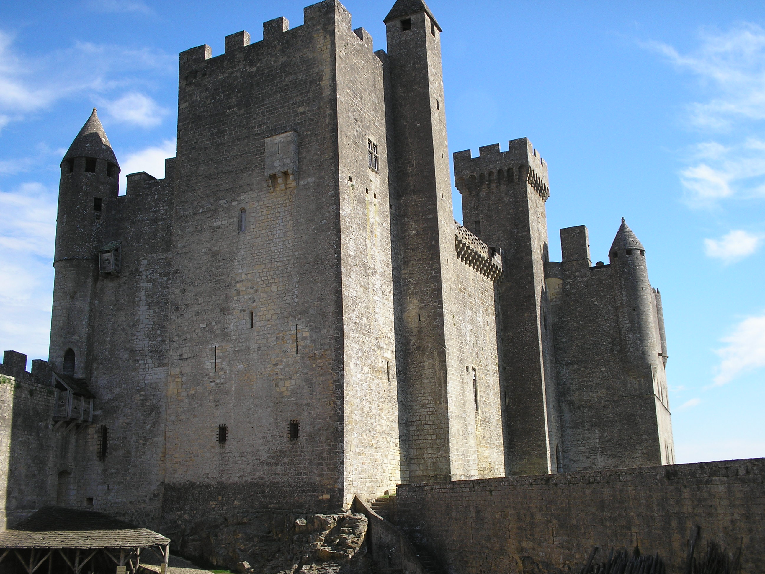 Donjon du XIIe siècle, Château de Beynac, France.